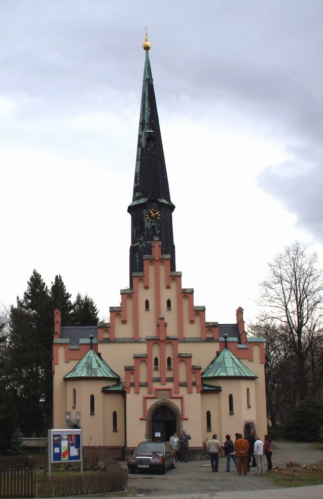 Weißenborner Kirche